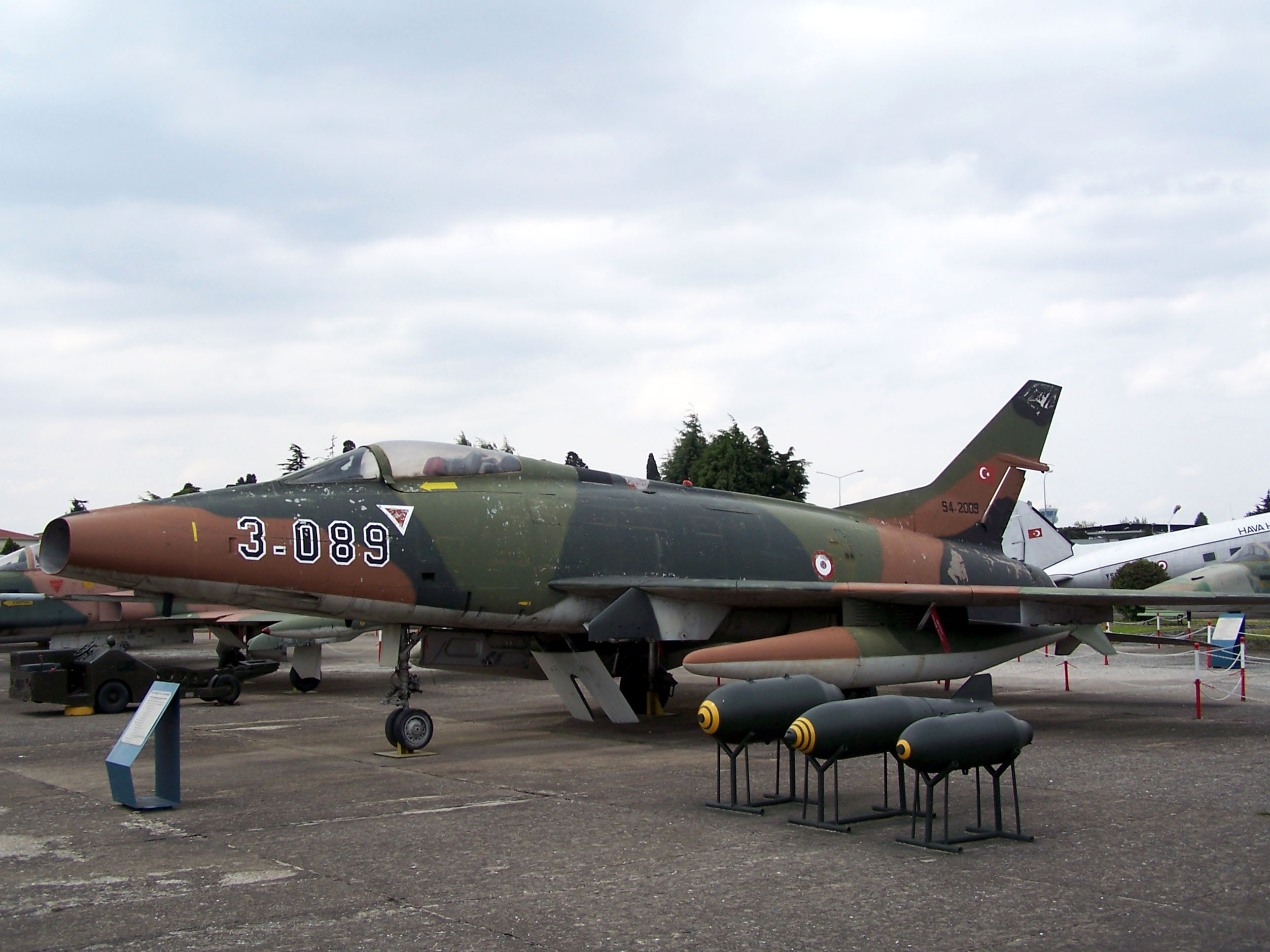 North American F-100 C Super Sabre in Istanbul Aviation Museum (İstanbul Havacılık Müzesi)